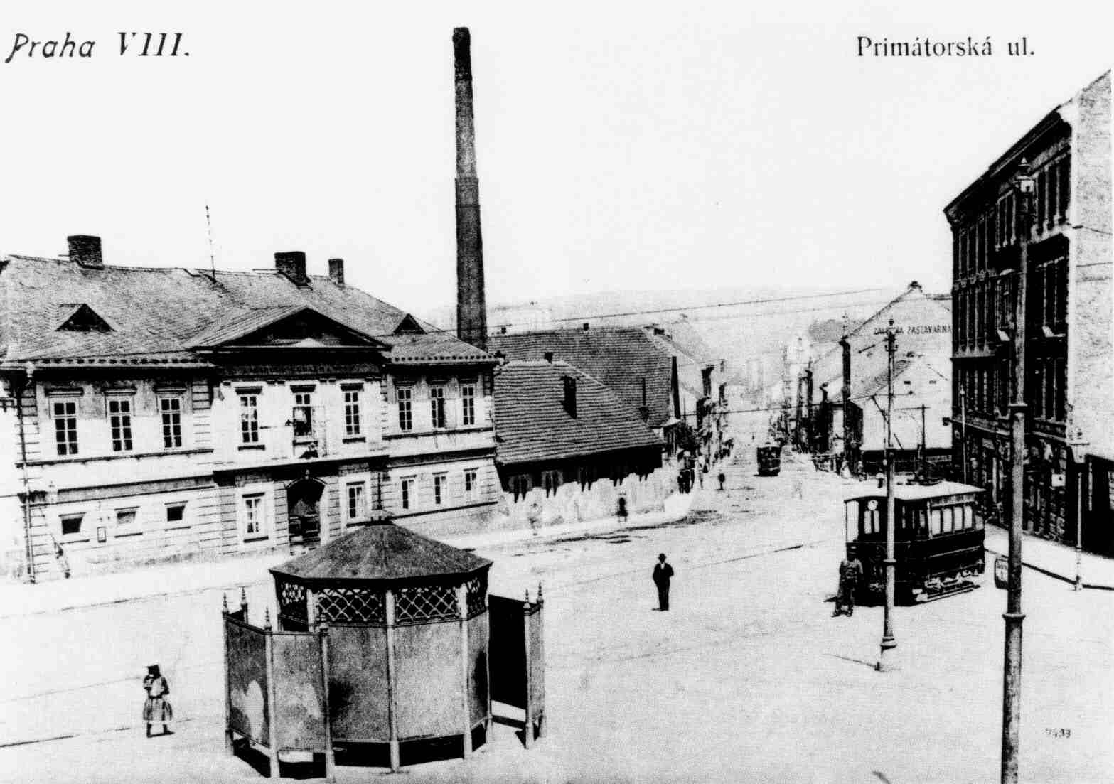 Libeň, křižovatka Královské třídy (dnes Sokolovská) a Primátorské ulice (dnes Zenklova) se záchodkem a usedlostí Stará Balabenka.